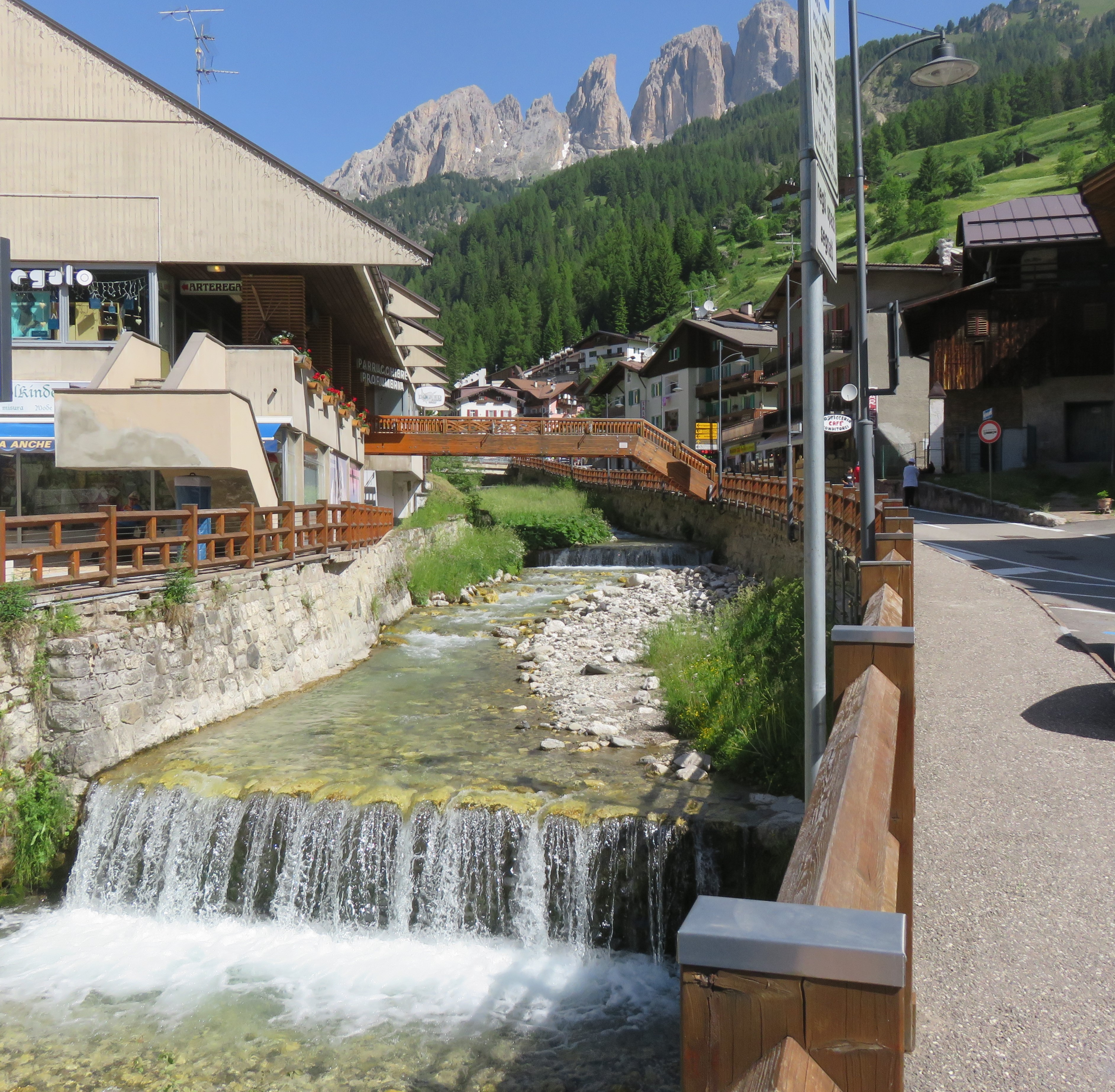 Panorama con torrente Duron